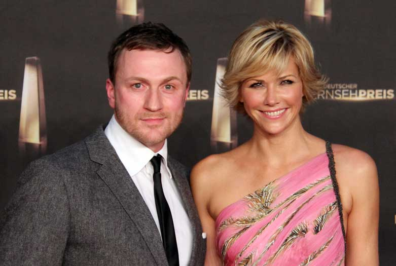 Anne Wis mit Begleitung beim Deutschen Fernsehpreis 2012